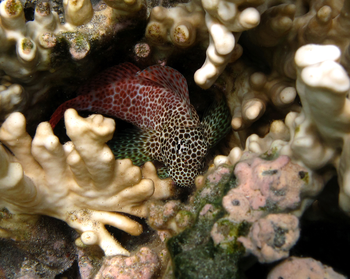 Une blennie léopard (Exallias brevis) dans un corail Millepora à la Réunion.